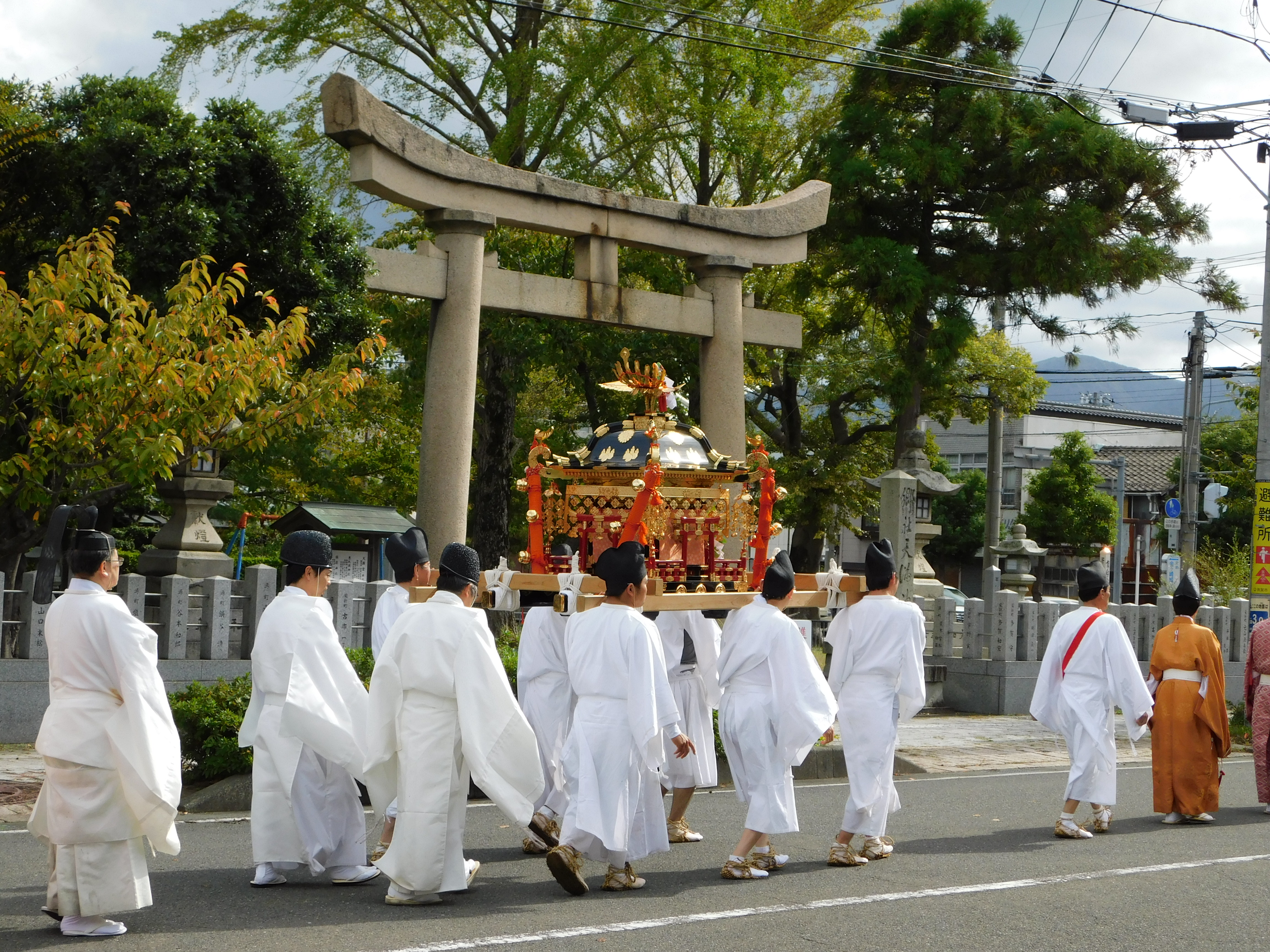 福井県敦賀市金崎宮の神事、御船遊管絃祭、御神体の神輿渡御。天満神社前を通過中。